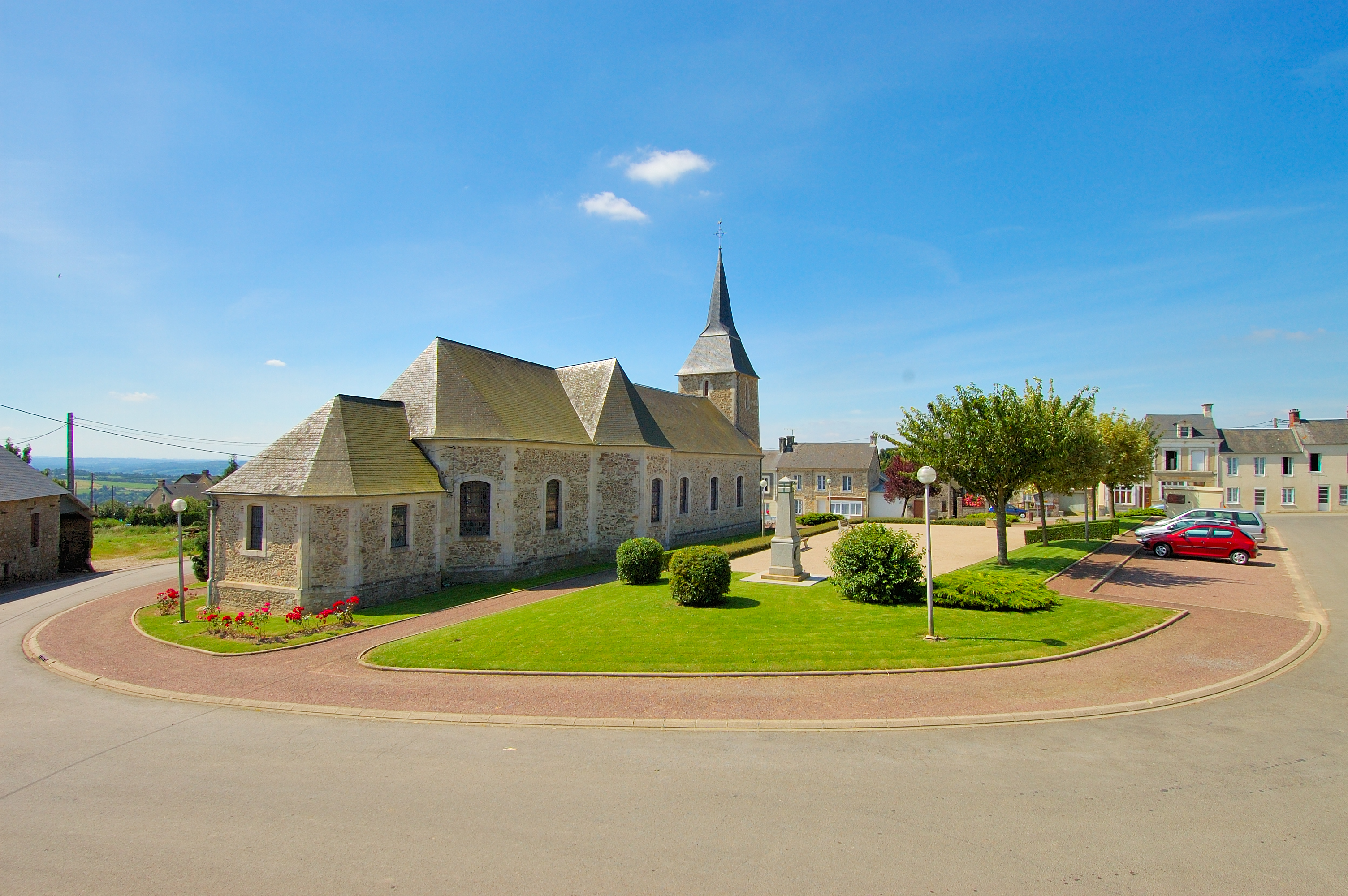 Pierrefitte-en-Cinglais : l'église Saint-Pierre-et-Saint-Paul et sa place.